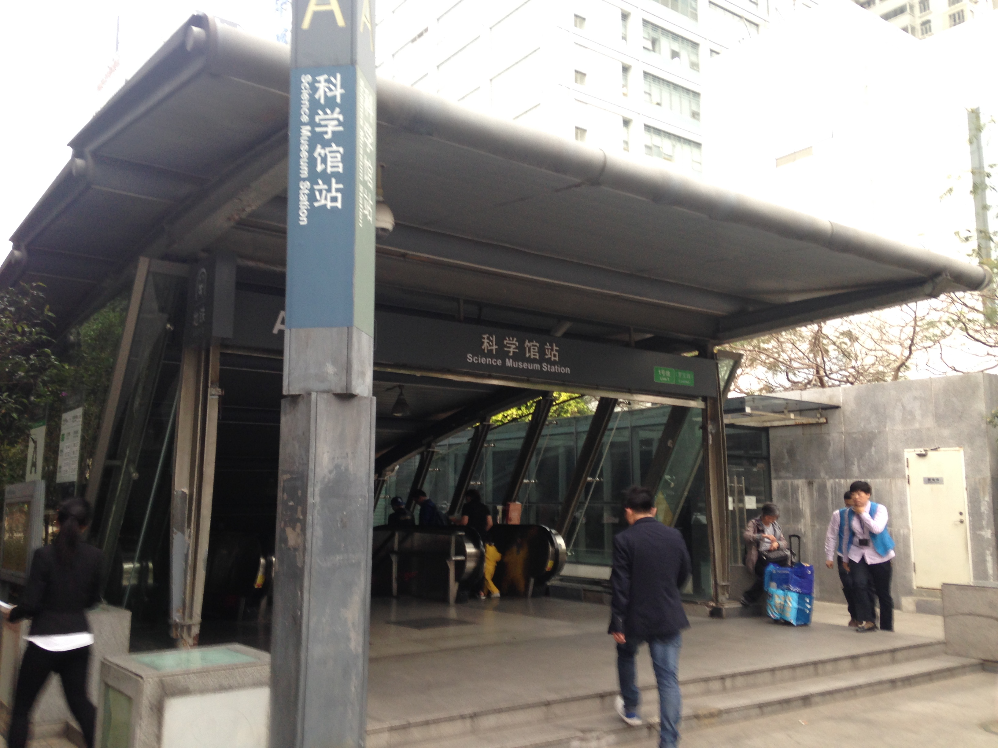 科学館駅の1番出入り口